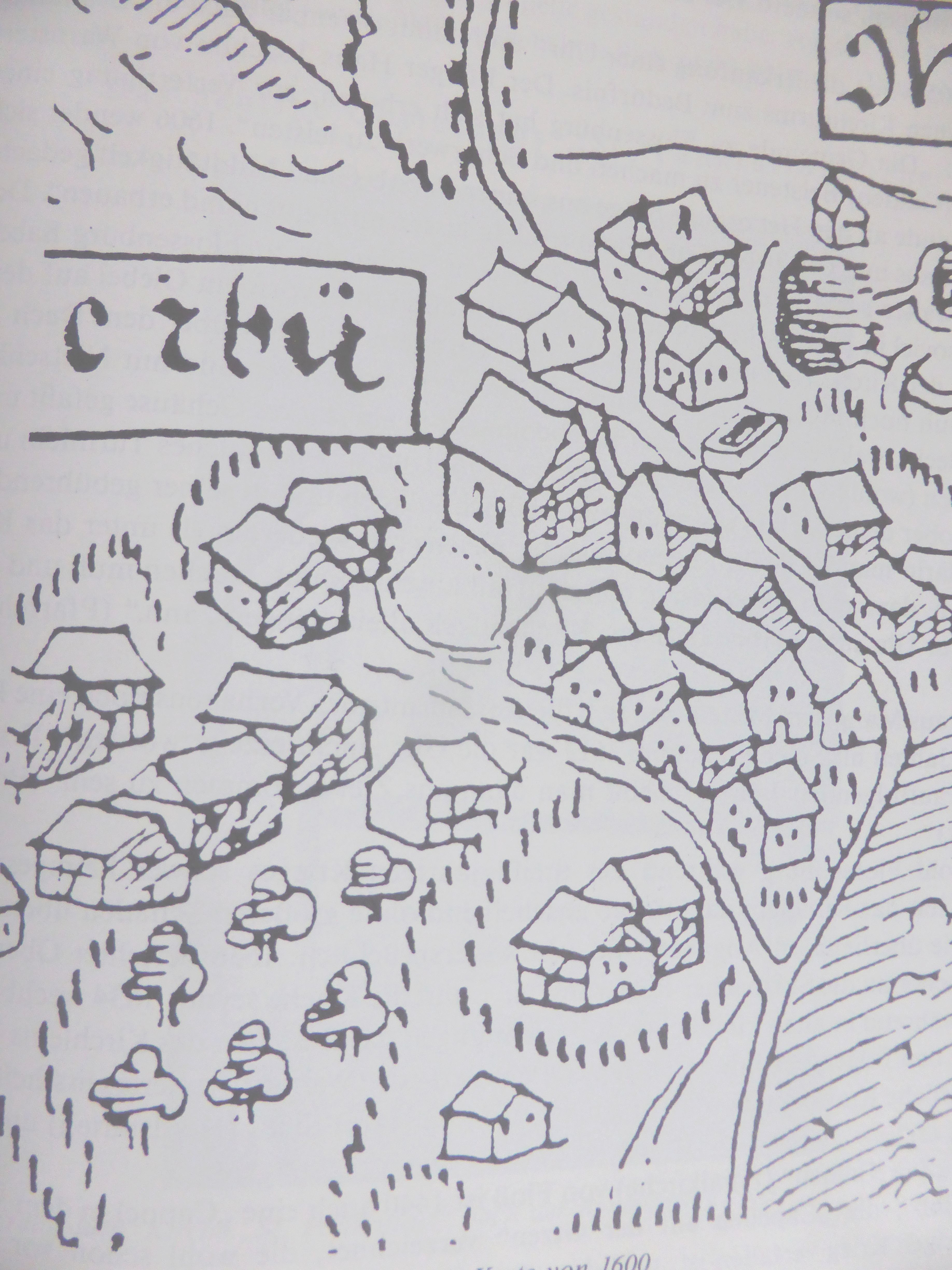 Ausschnitte aus dem Libellus Chronologicus et Topographicus des f[ürstlich] pfaltzgr[äflichen] Grichts Calmüntzes auf dem Nordgau im Landgri[cht] Lengfeld, mit all seinen anrainenden Embtern, auch inligenden Hofmarchen, Marckht, Pfarrn, Dorffern, Weilern, Mühlen, Holtzern, Flüssen, Bechen, Bruckhen, Stegen, Wegen, Grenitzstein und Marchungen Zusammengebracht und beschriben durch Christophorum Vogelium Pfarrern zu Regenstauf von 1600